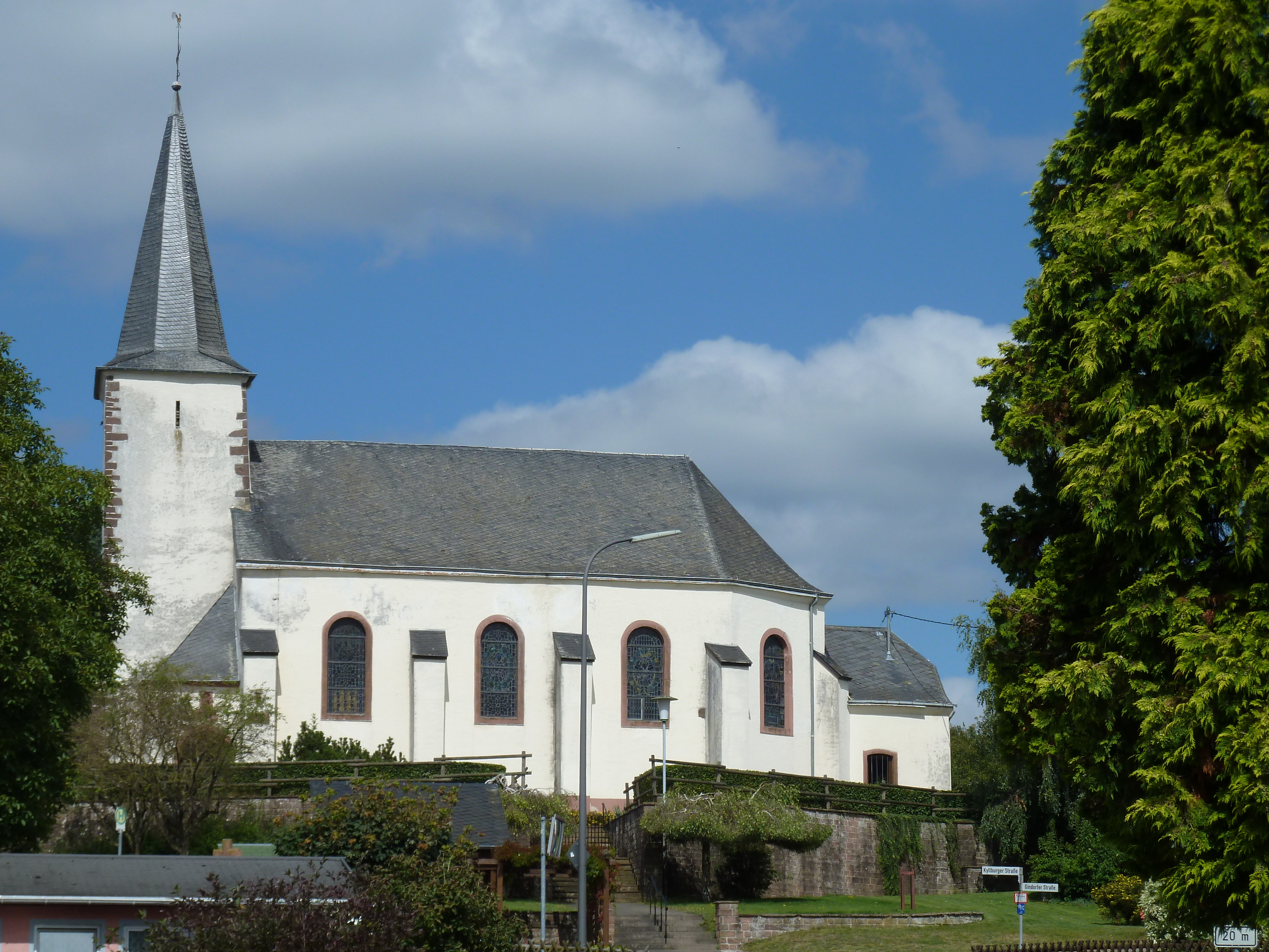 De sint Peter kerk in Orsfeld